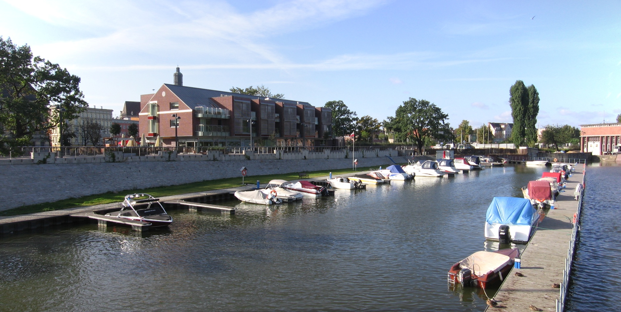 Odra w okolicach Mariny Śródmiejskiej we Wrocławiu Marina Śródmiejska (pośrodku), w głębi po prawej Północna Elektrownia Wodna